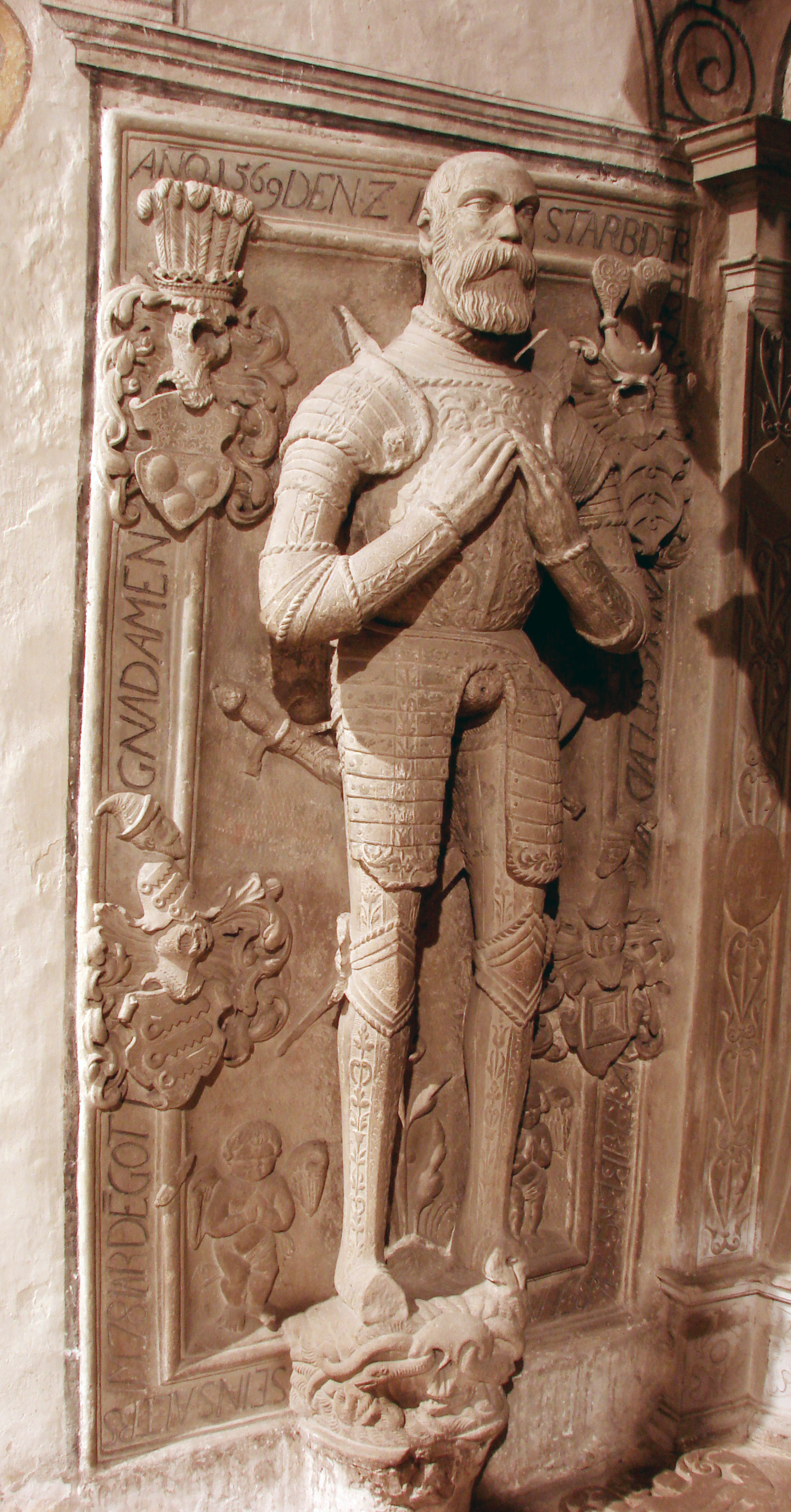 Freiberg am Neckar, epitaph for Ludwig von Freyberg, †1569, in the St. Amandus church